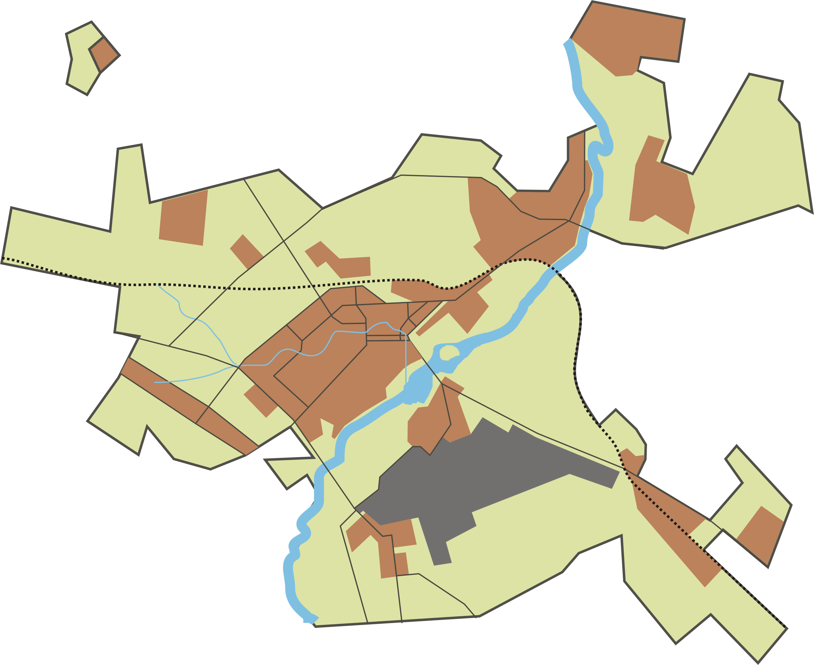 Позкарта Липецка